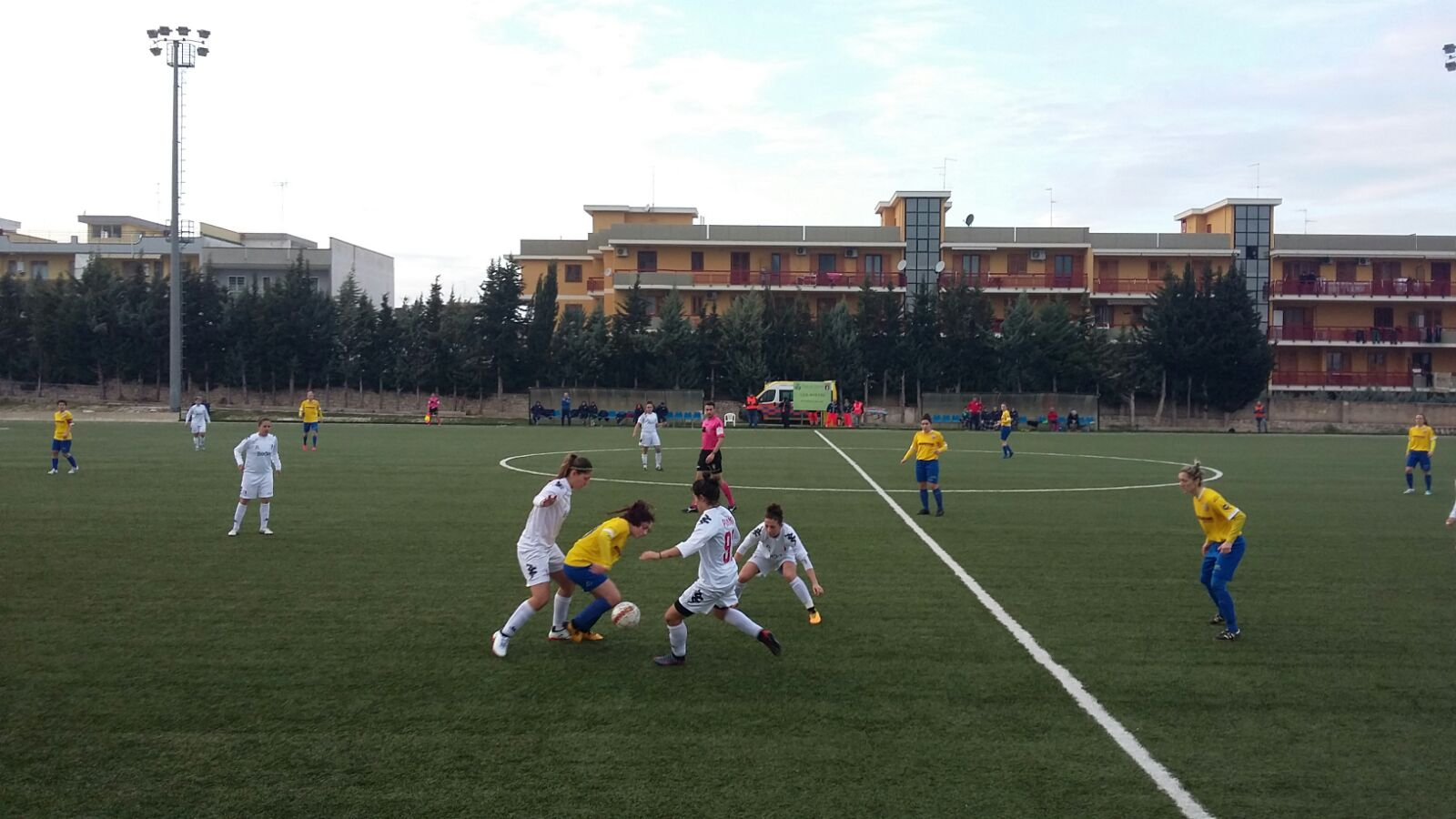 La fotografia è stata scattata nel pomeriggio del 13 gennaio 2018 al campo sportivo Antonio Antonucci di Bitetto, e ritrae un'azione della gara Pink Sport Time-Tavagnacco, valevole per la decima giornata della Serie A di calcio femminile (finita 1-0 in favore della squadra di casa). Essendo io l'autore della fotografia, realizzata con il mio smartphone, la rilascio in libera licenza.